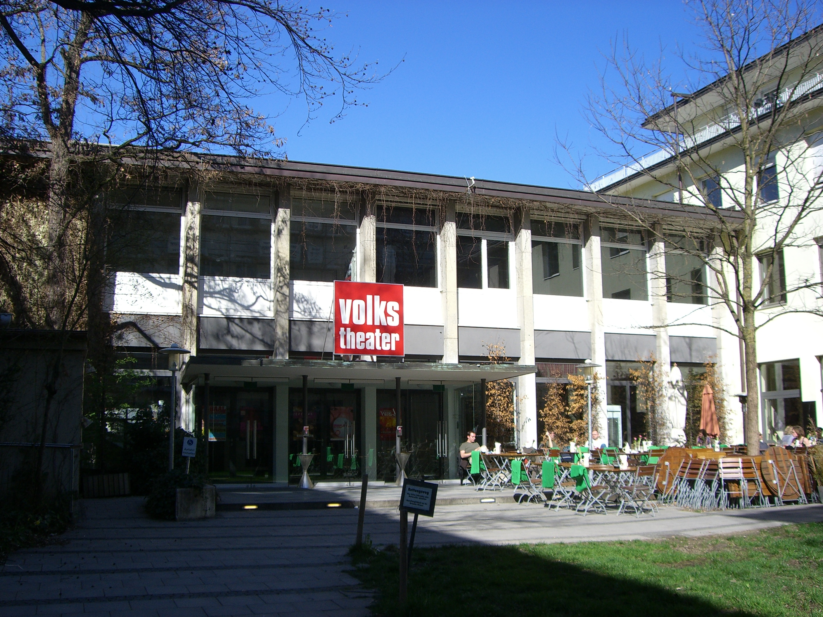 München: Volkstheater